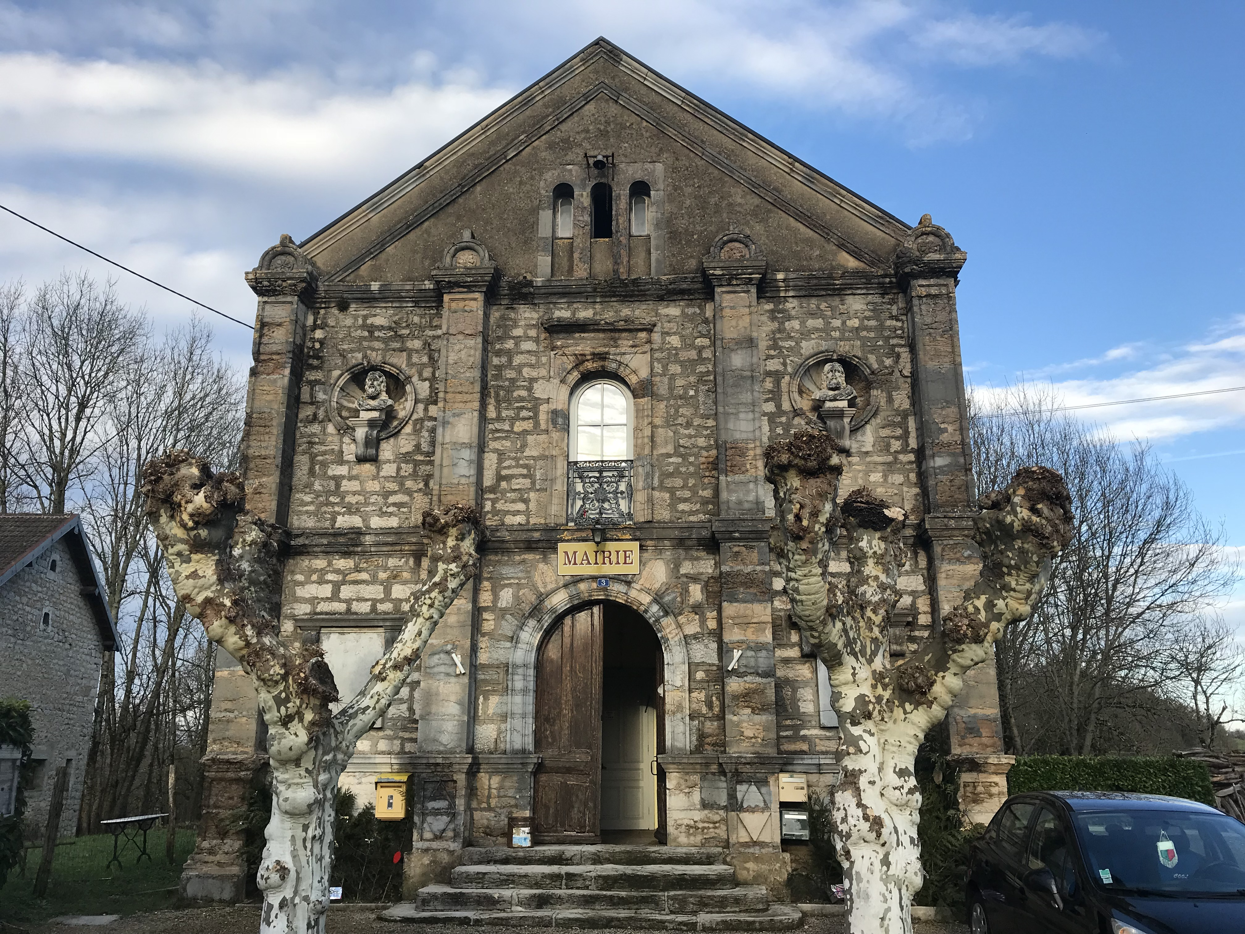 Mathenay (Jura, France) en janvier 2018.